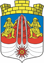 Герб посёлка Надвоицы, Карелия, Россия